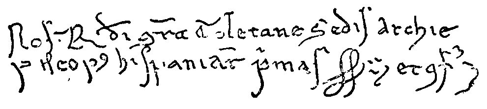 Firma de Rodrigo Jiménez de Rada (1170-1247), arzobispo de Toledo.